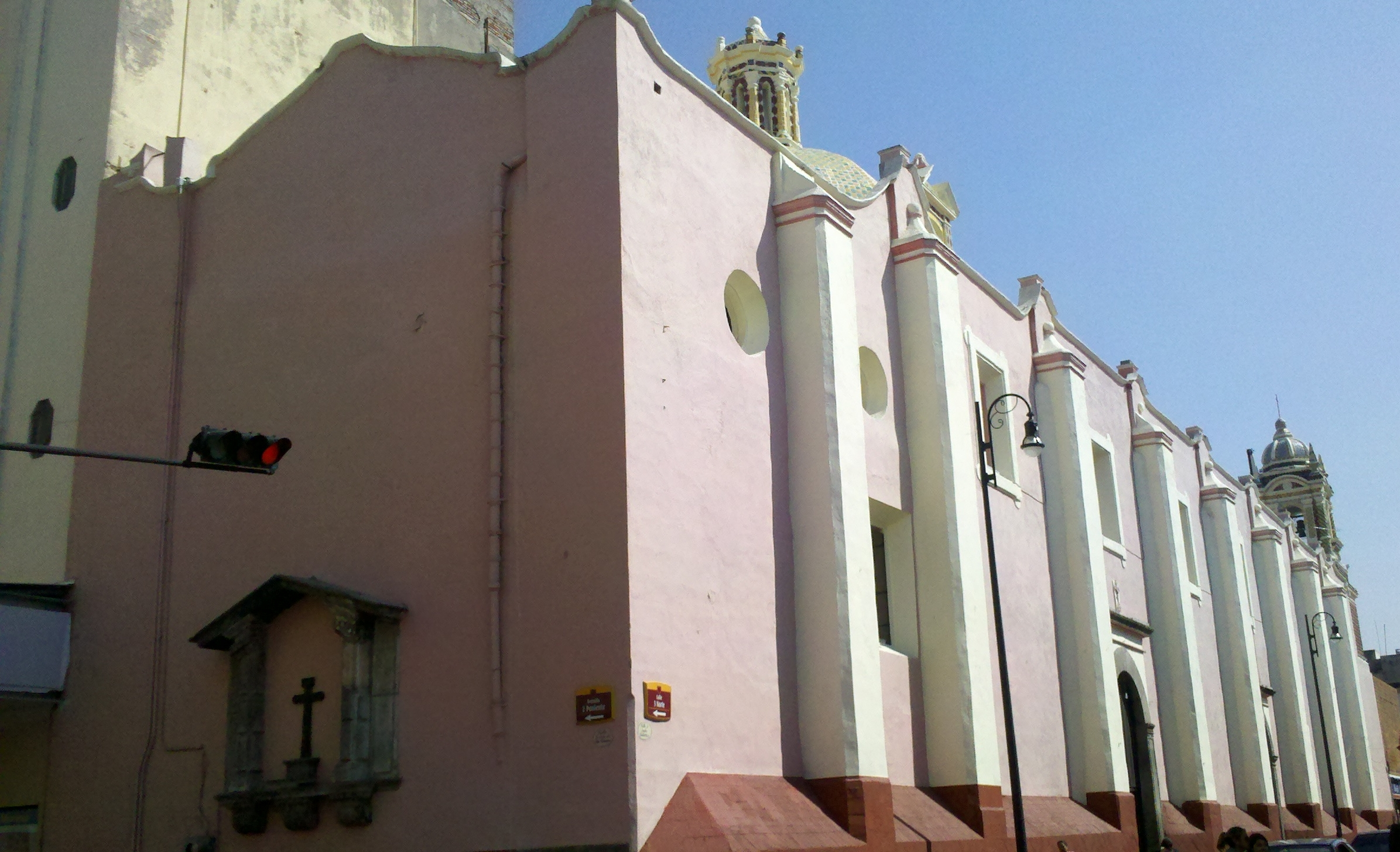 Templo de Santa Catalina de Siena, Puebla, México. 3 norte 201.